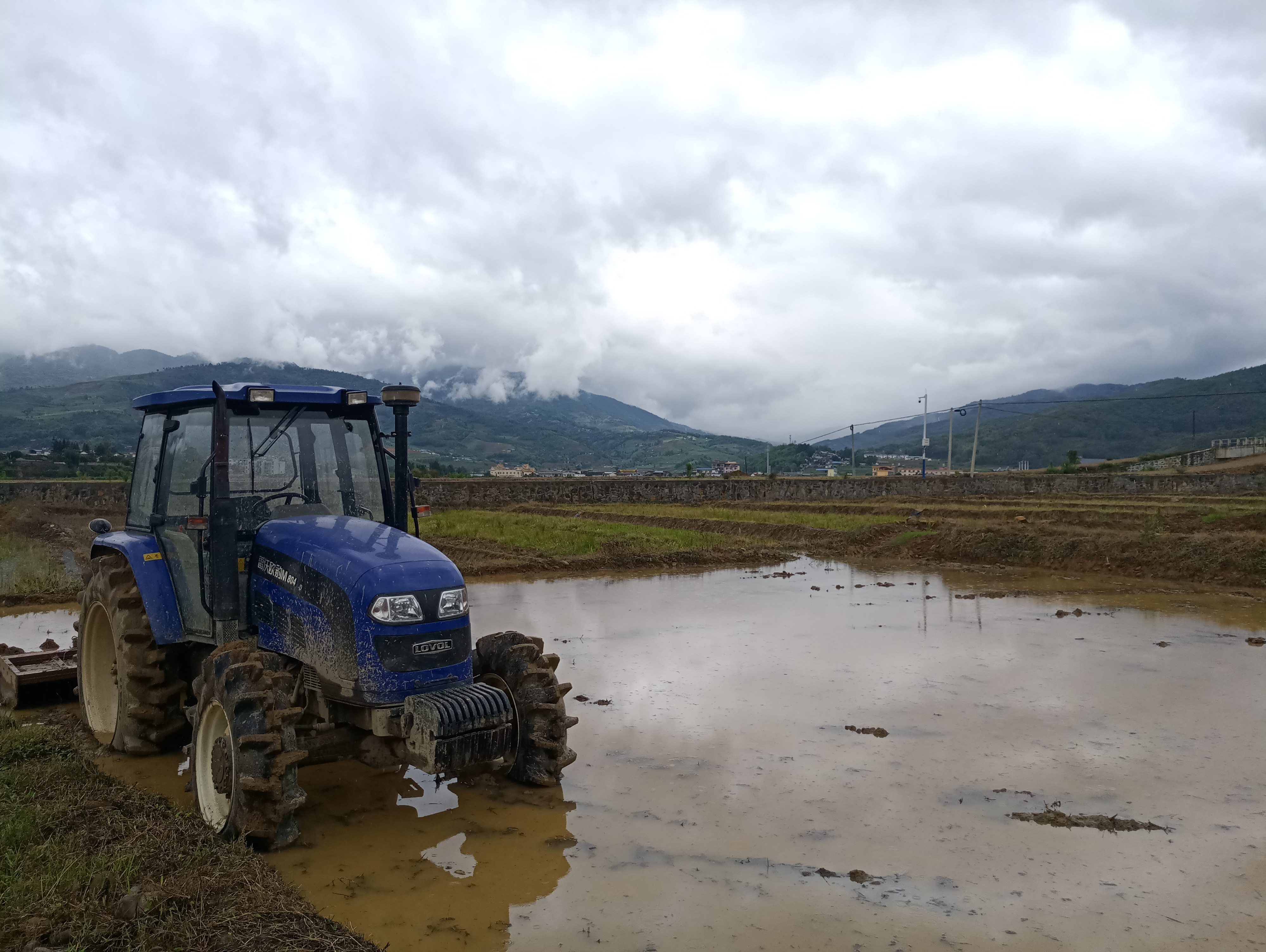 中文（中国大陆）: 芒海镇-农田